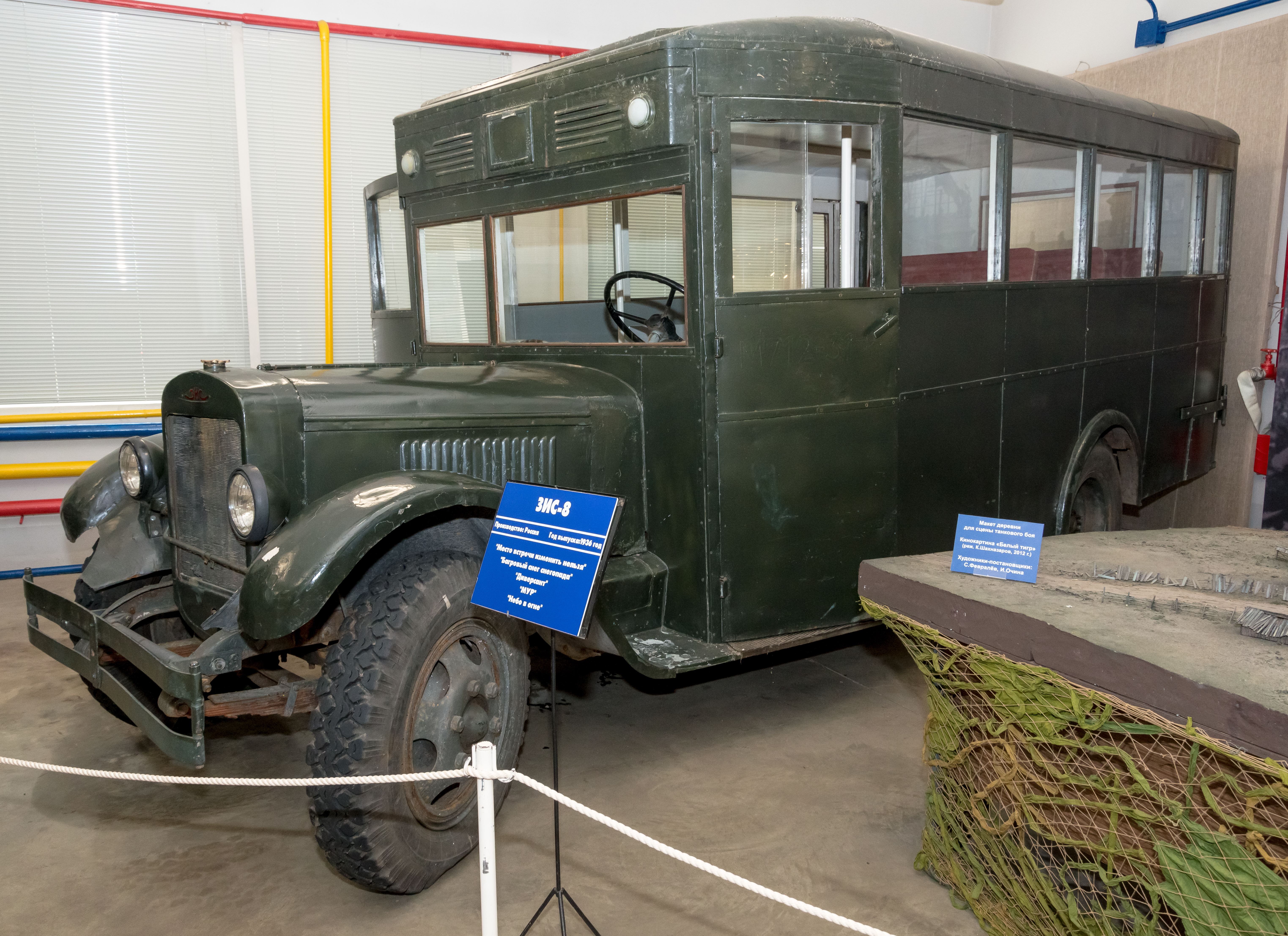 Место встречи изменить нельзя ЗИС-8